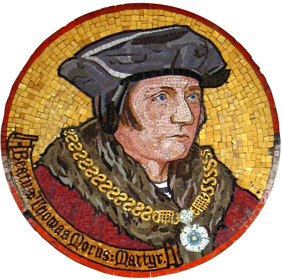 Portrait de Saint Thomas More, mort à Tower Hill (Londres) en 1535.